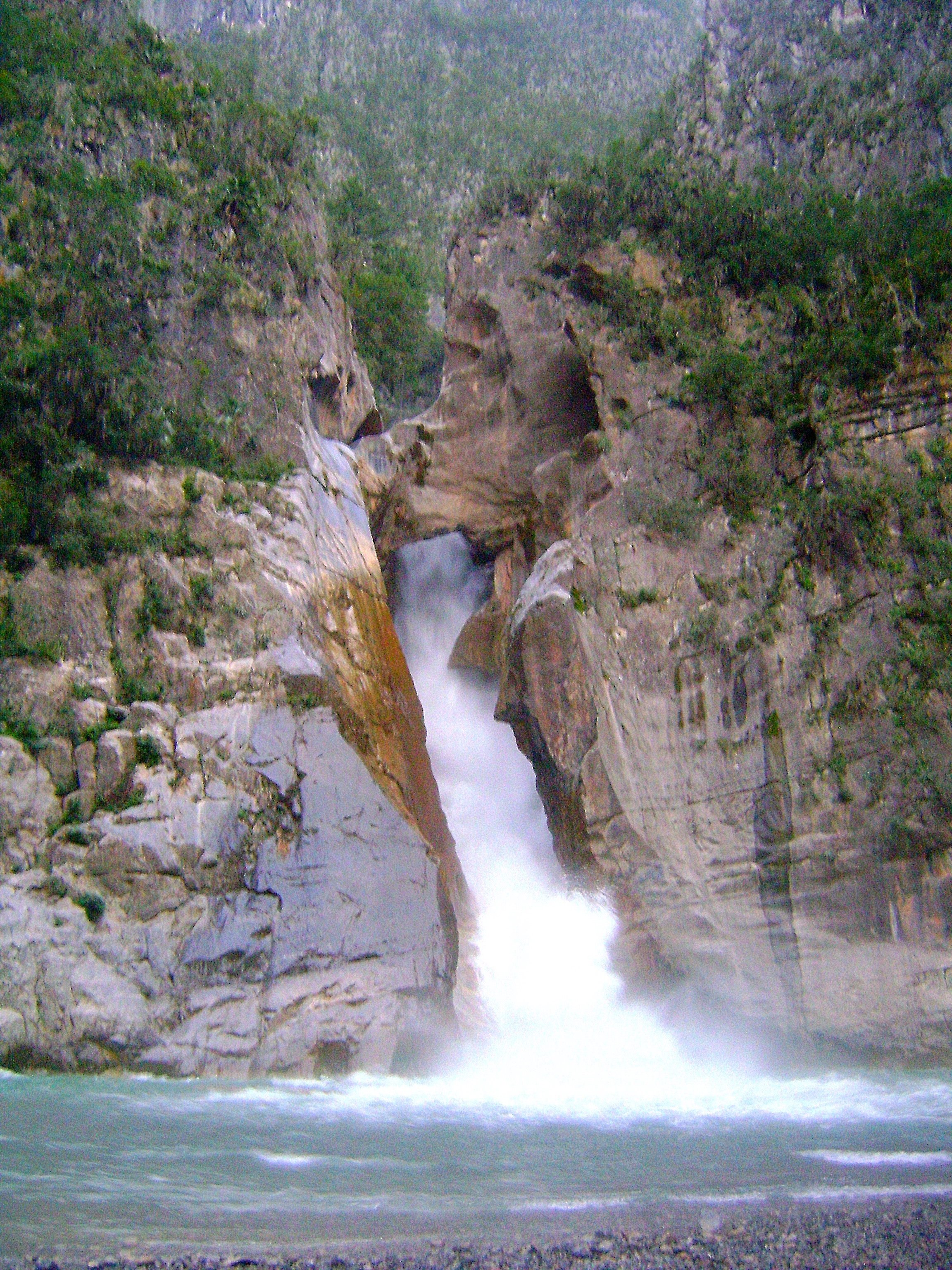 El Salto